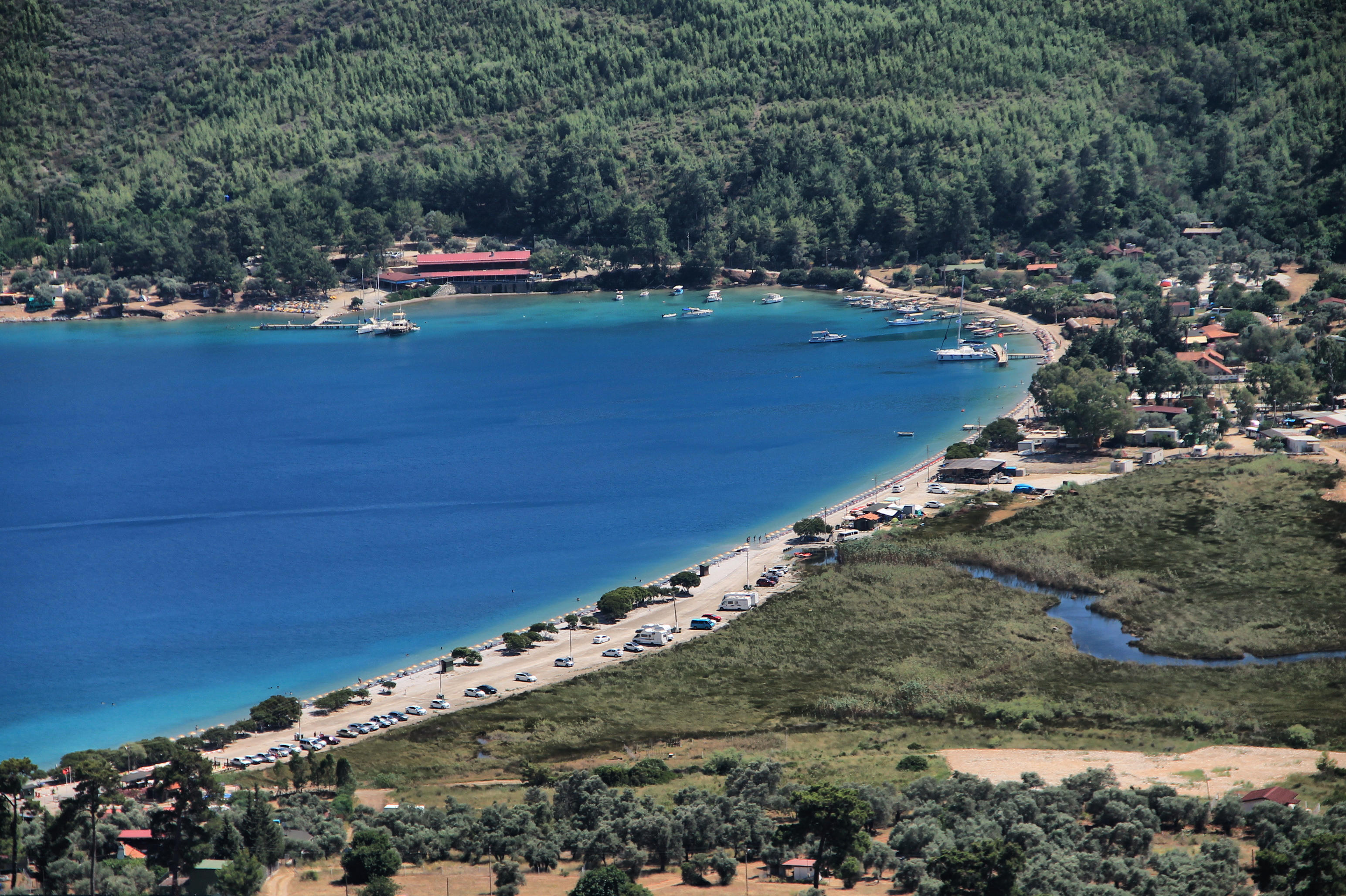 Unnamed Road, 48220 Kultak/Milas/Muğla, Turkey